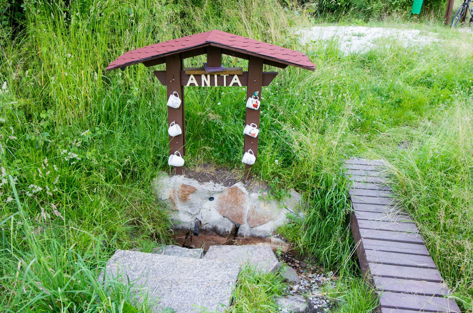 Minerální pramen Anita, Nebanice, katastr Chotíkov u Kynšperku, okres Cheb